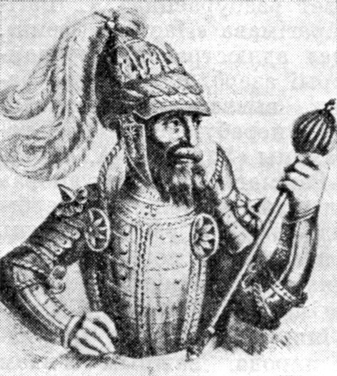 Портрет вел. князя Великого княжества Литовского Ольгерда.